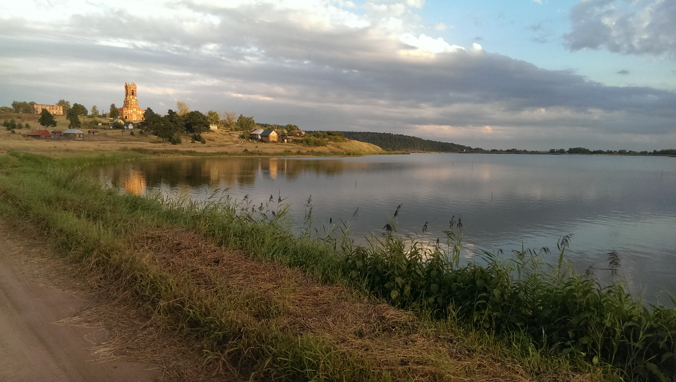 Монастырский комплекс: Бабыкино, Сараевский район, Рязанская область